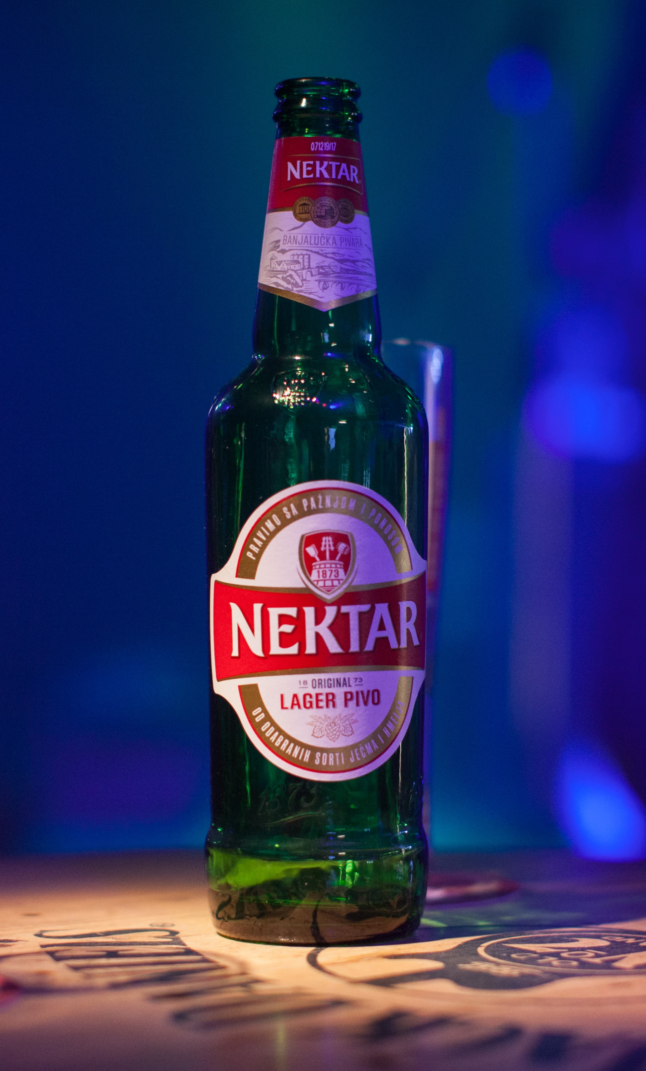 Flaša Nektar piva